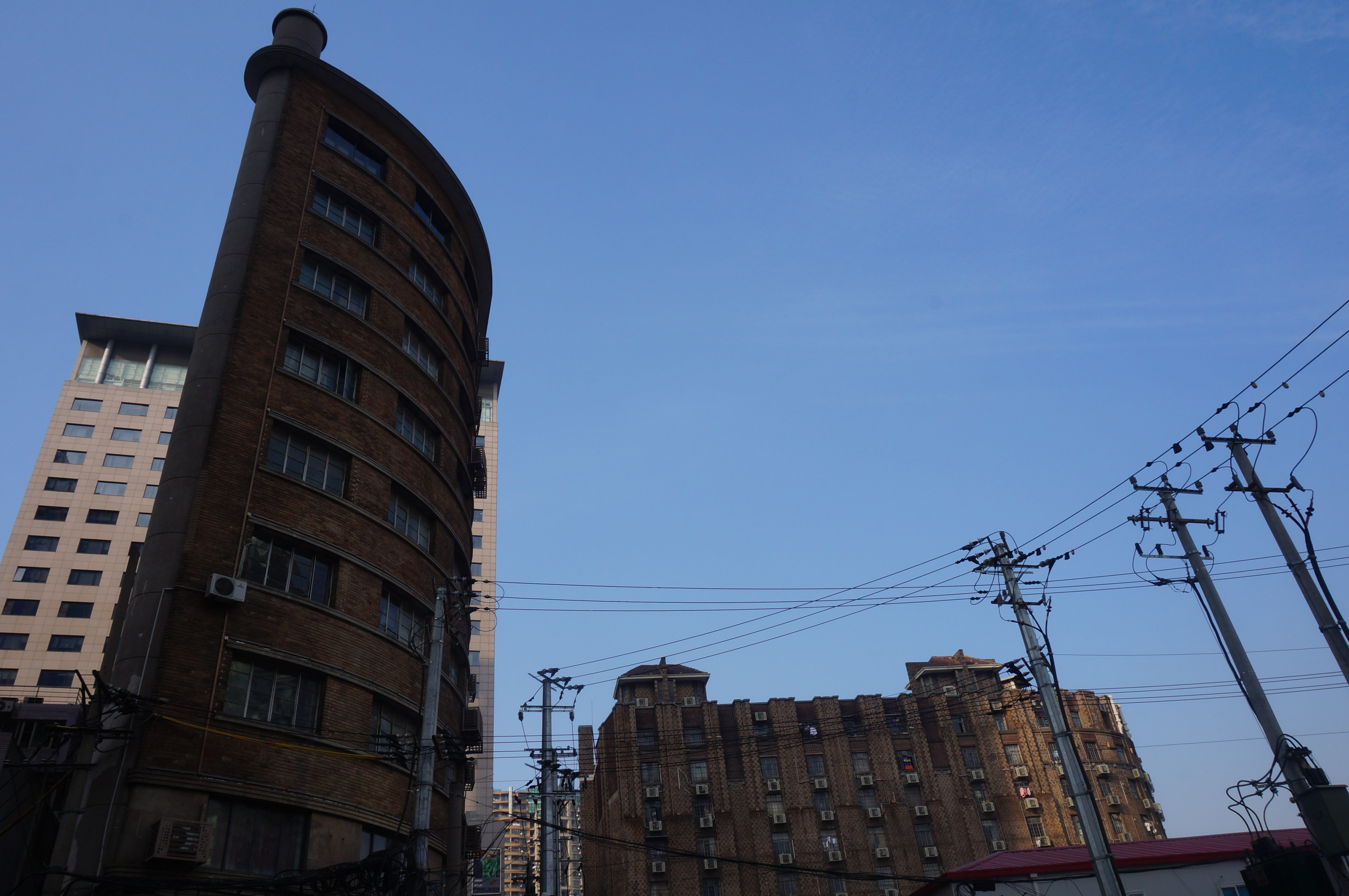 同孚大楼与德义大楼